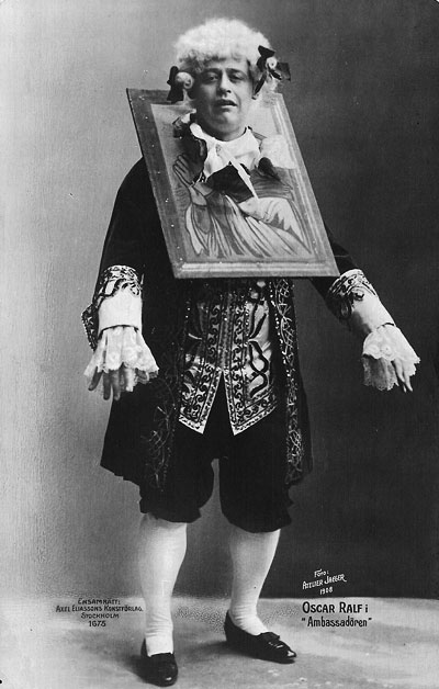 Oscar Ralf